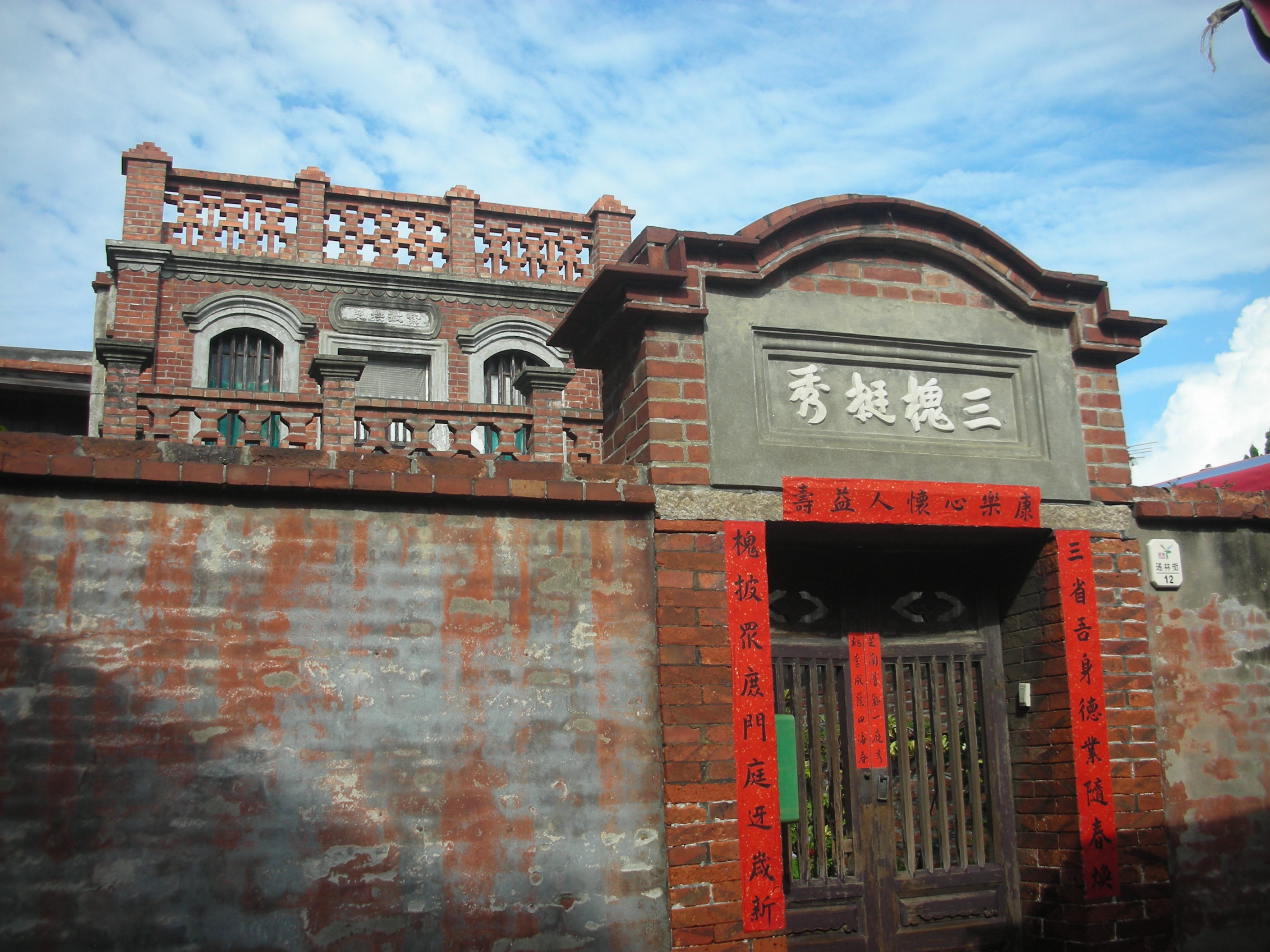 鹿港老街 三槐挺秀宅 Lukang Old Street